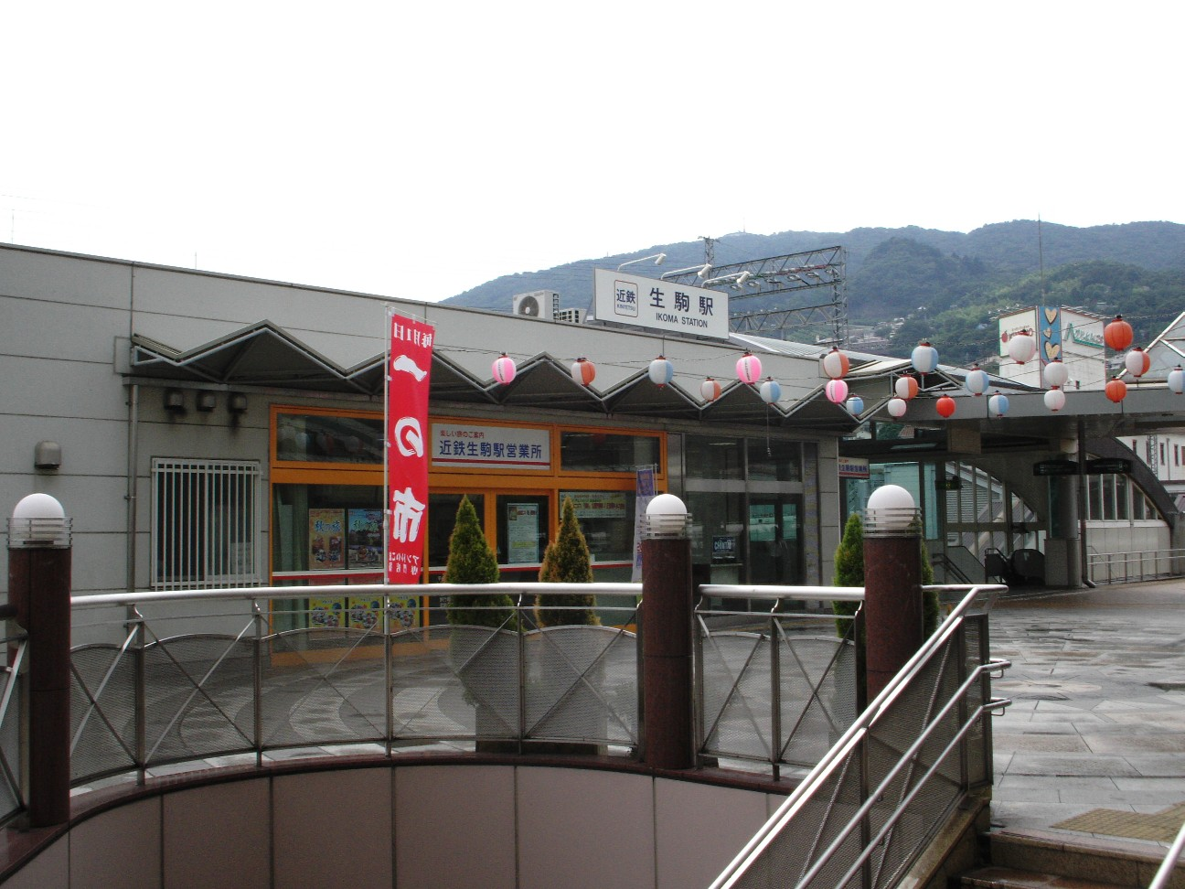 生駒駅